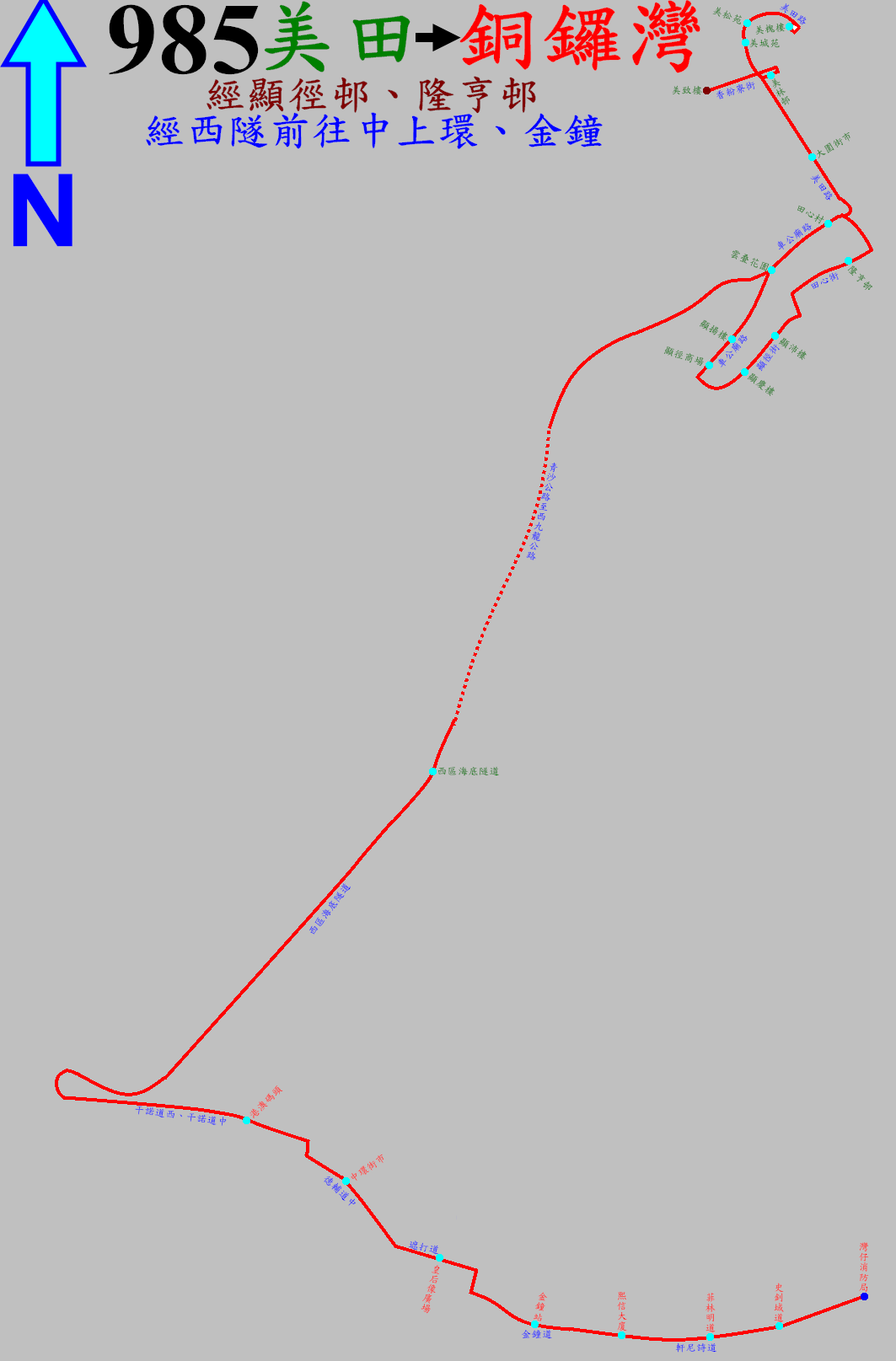 中文（香港）: 過海隧巴985線的走線圖